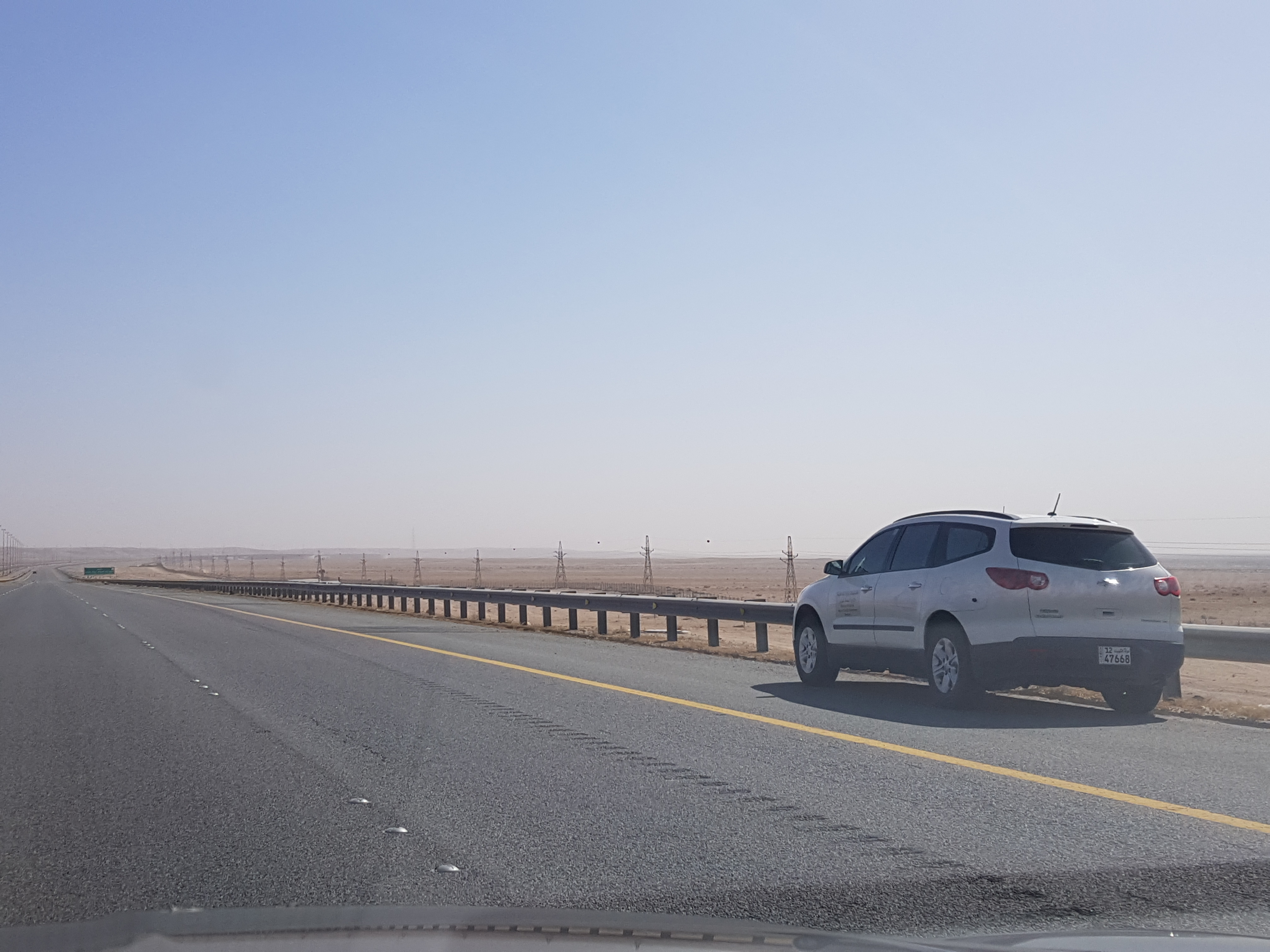 كاميرا مرورية متنقلة تابعة لوزارة الداخلية